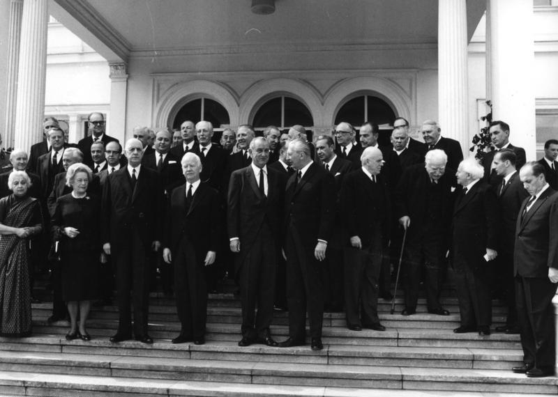 Bonn, 25. April 1967 Empfang in der Villa Hammerschmidt, dem Amtssitz des Bundespräsidenten, anläßlich des Staatsbegräbnisses von Bundeskanzler Dr. Konrad Adenauer. 1. Reihe, v.l.n.r.: Frau Pandit, Frau Lübke, Präsident Charles de Gaulle, Bundespräsident Heinrich Lübke, Präsident Lyndon B. Johnson, Bundeskanzler Kurt Georg Kiesinger, John McCloy, Joseph Bech und David Ben Gurion